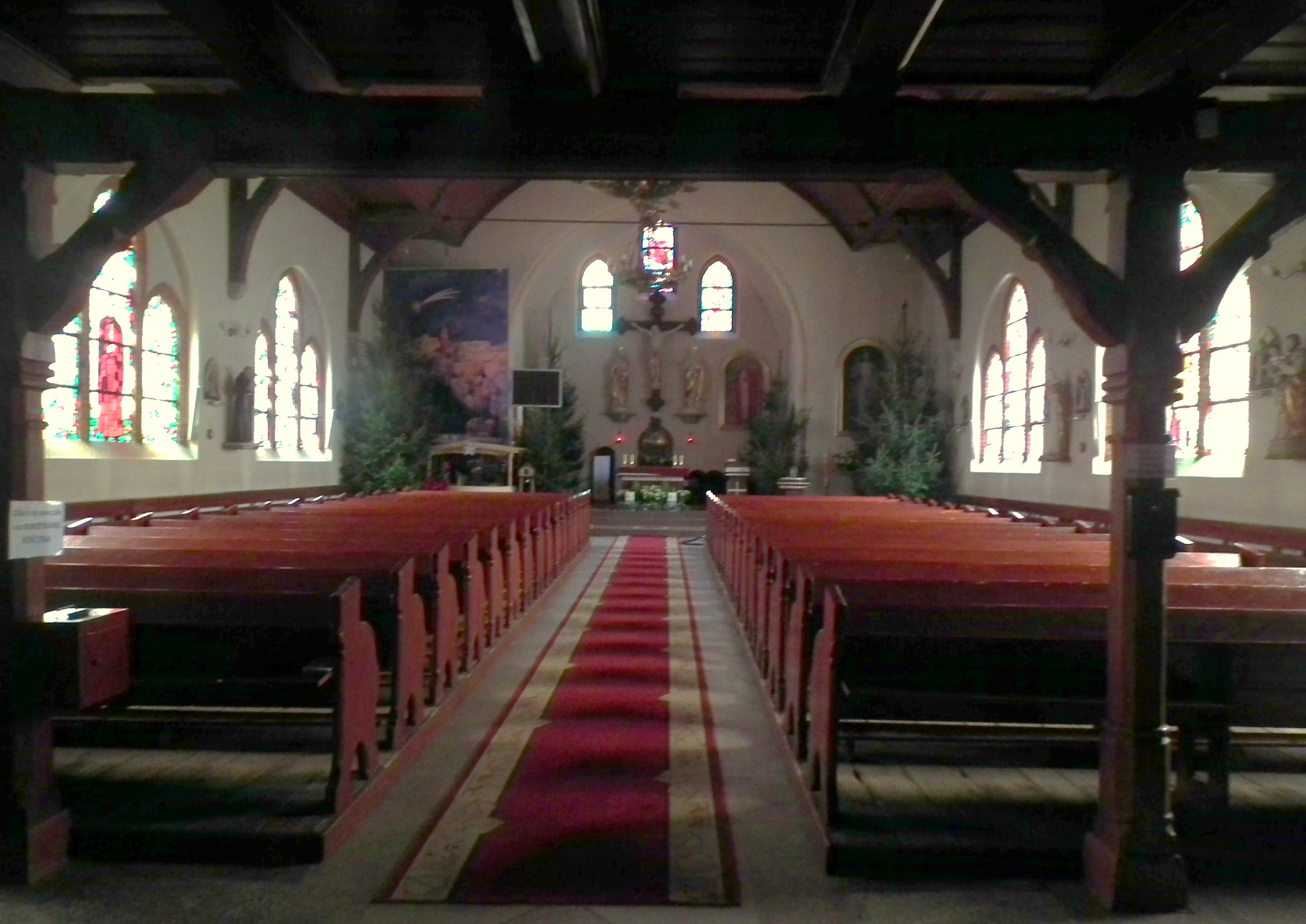 Kościół Świętego Ducha - Szczecin Zdroje.